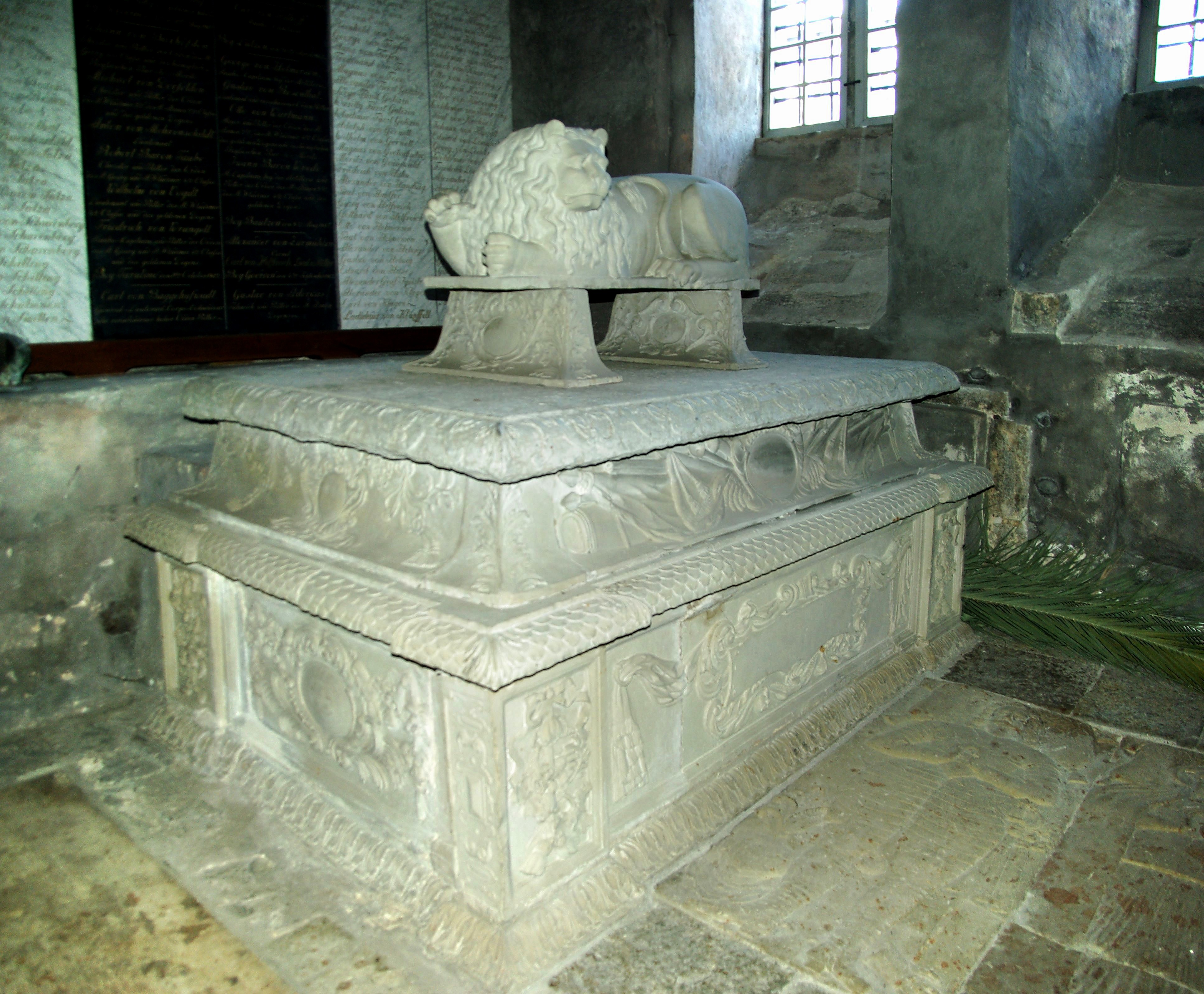 Otto Wilhelm von Ferseni hauamonument, 18. saj. algus (paas)